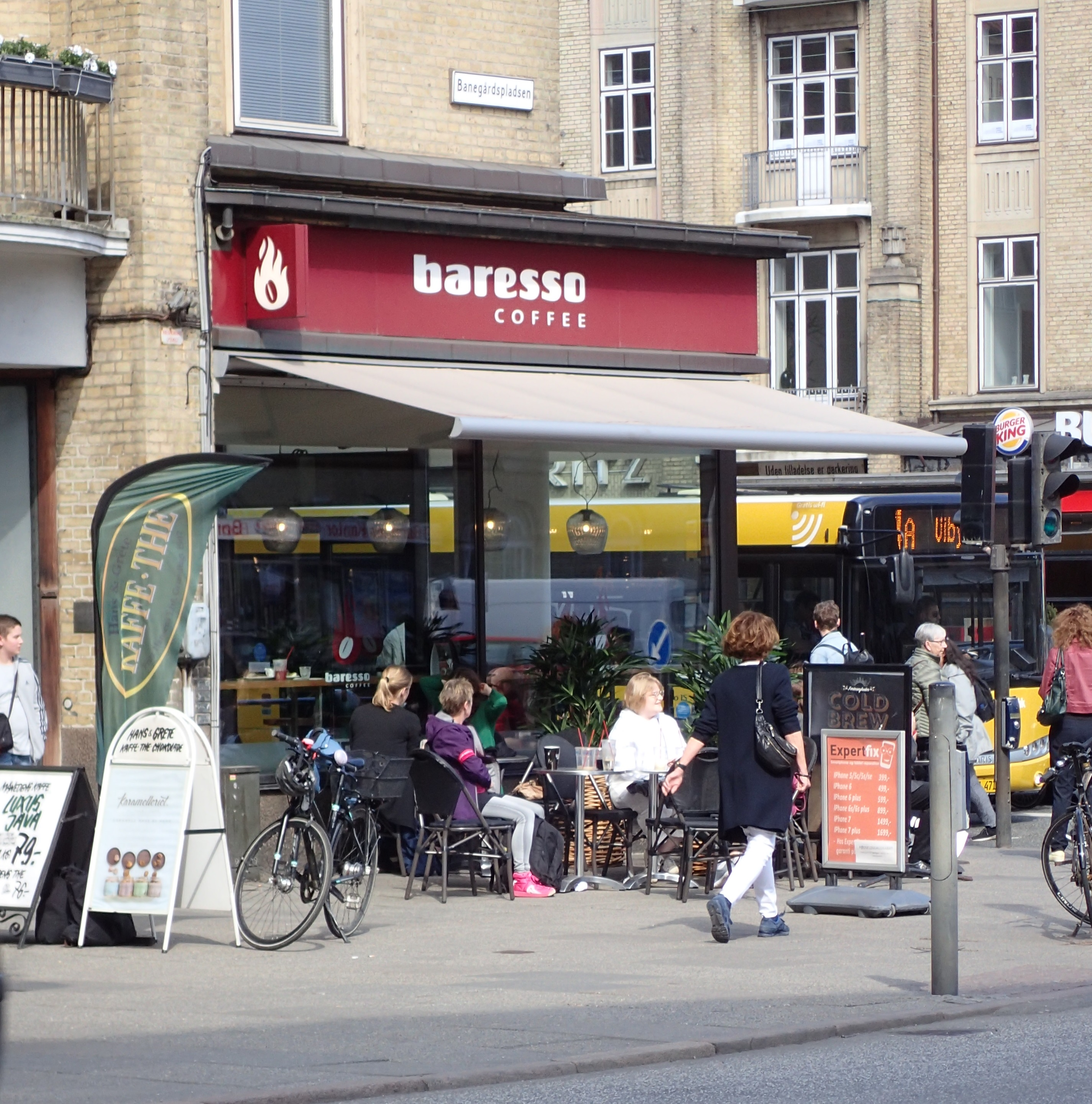 Baresso Café i Aarhus